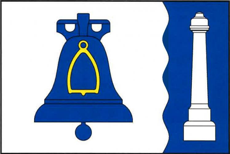 Velký Vřešťov vlajka